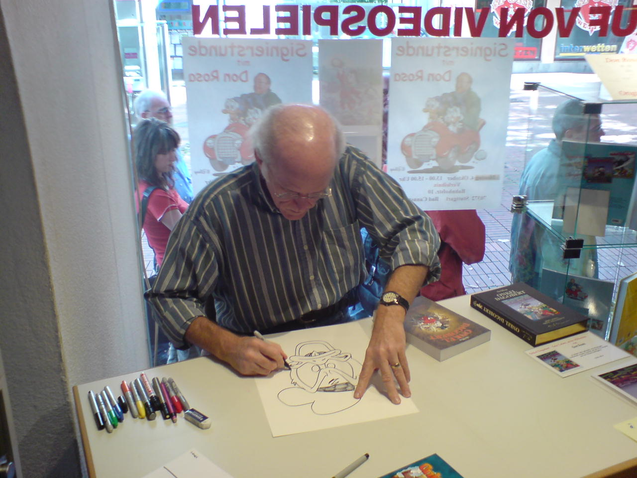 Disney-Zeichner Don Rosa bei einer Signierstunde in Stuttgart